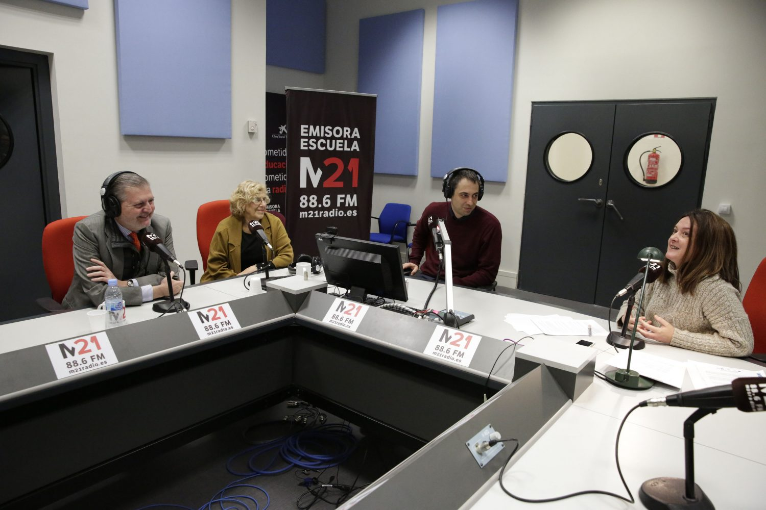 La emisora escuela del Ayuntamiento de Madrid M21 ha recibido en la mañana de hoy martes, 7 de marzo, la visita del ministro de Educación, Cultura y Deporte, Iñigo Méndez de Vigo, quién acompañado por la alcaldesa de Madrid, Manuela Carmena, ha participado, además, en el programa La Corrala, la revista radiofónica matinal que hace Cristina Sánchez Barbarroja.